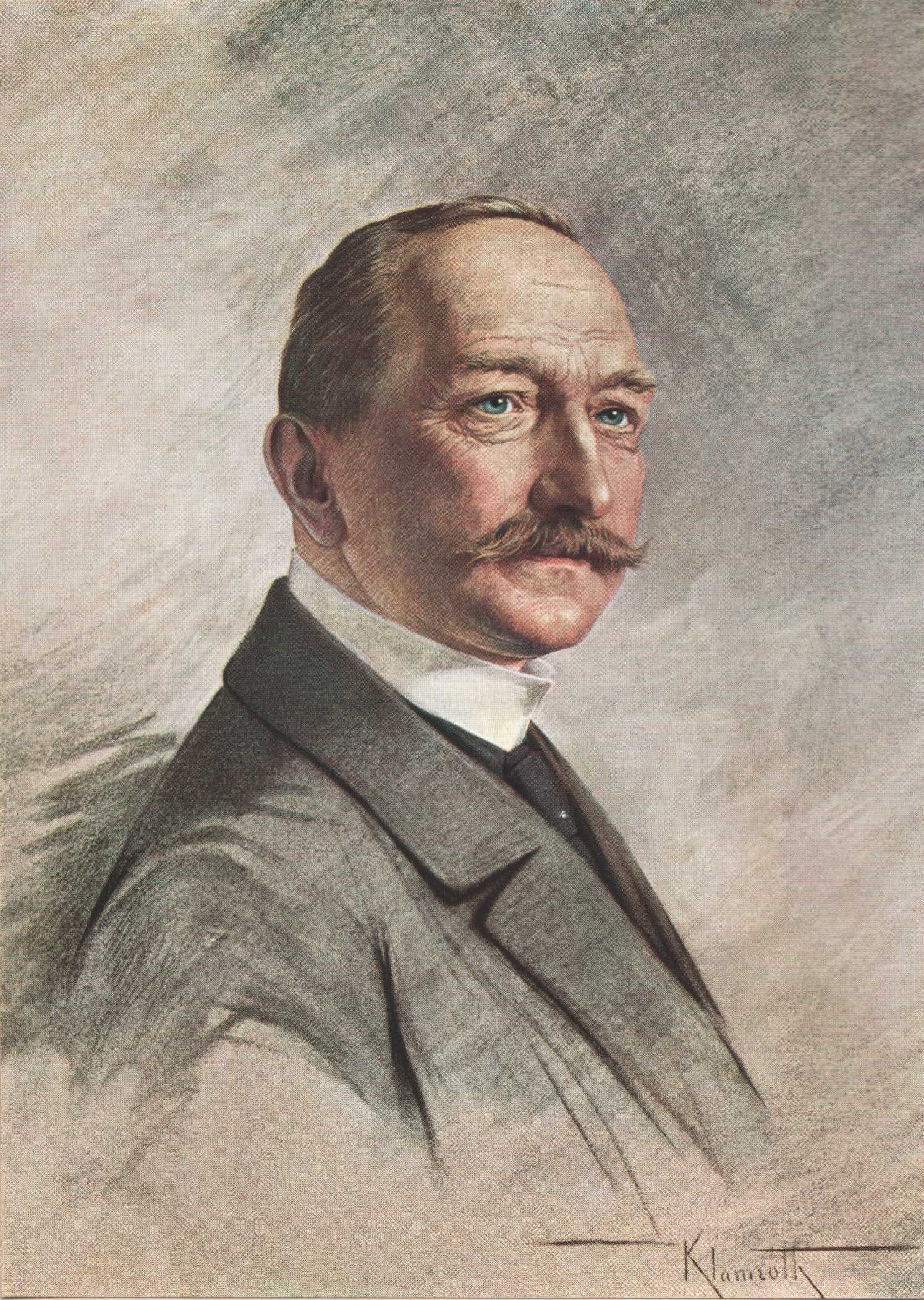 300 Jahre Familie Thorer - 50 Jahre Theodor Thorer. Seite 33. Paul Albert Thorer (*5.3.1858 in Görlitz, + 8.4.1920 in Leipzig), Rauchwarenkaufmann. Farbige Reproduktion aus: 325 Jahre Familie Thorer - 75 Jahre Theodor Thorer. Leipzig 1937, Seite 25.